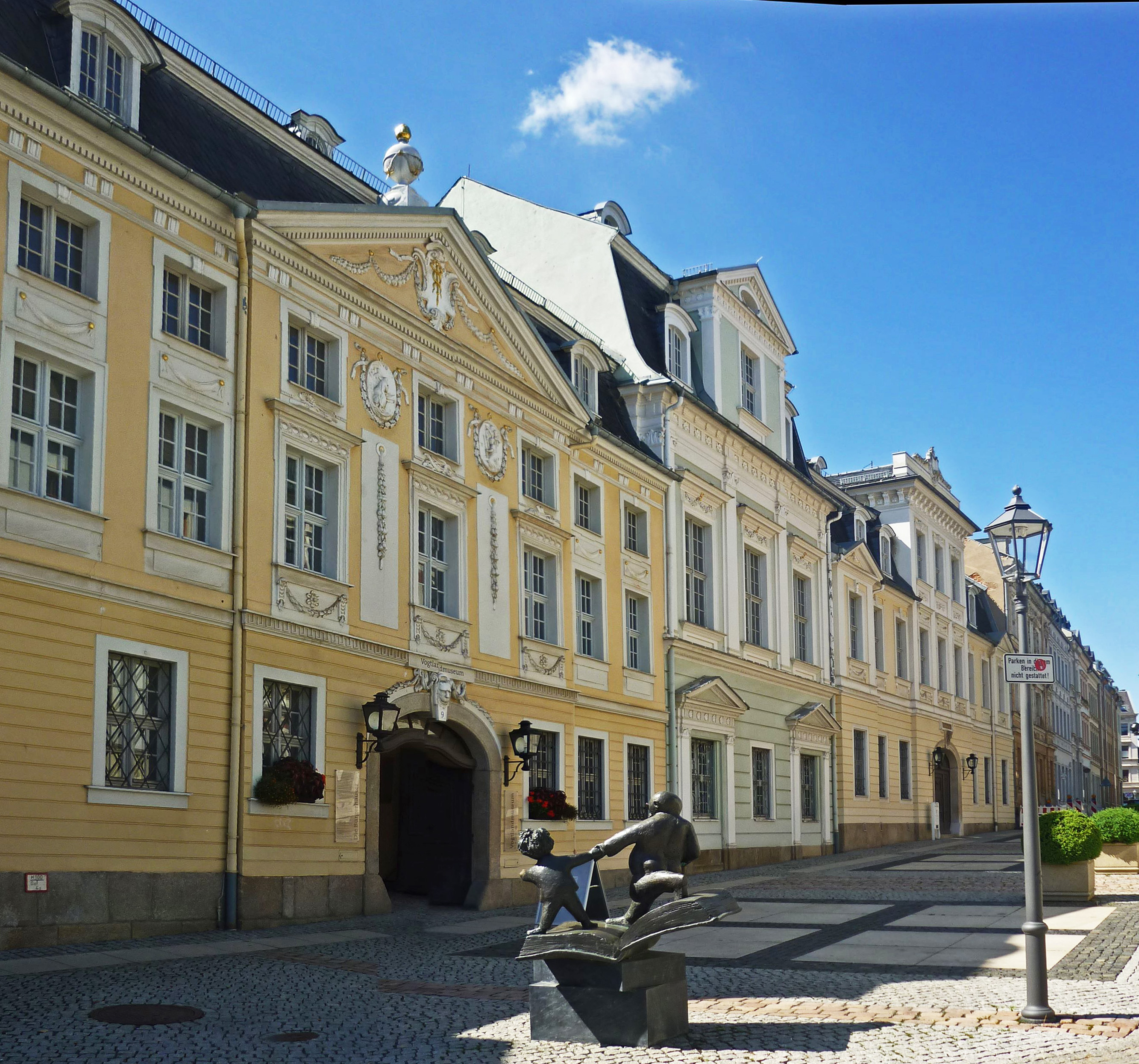 Die Nobelstraße in Plauen mit dem Vogtlandmuseum und dem Vater-und-Sohn-Denkmal